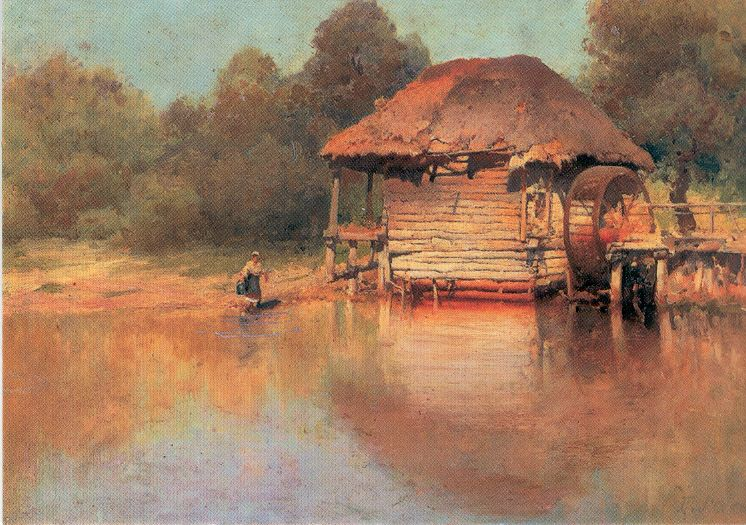 Watermilllabel QS:Len,"Watermill" label QS:Lde,"Wassermühle" label QS:Luk,"Водяний млин"